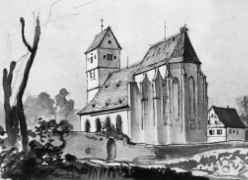 Eine Ausstellung im Heimatmuseum Echterdingen: Alte Ansichten unserer Stadt. In: Amtsblatt Leinfelden-Echterdingen Nr. 49 vom Freitag, 6. Dezember 2002. Die folgenden zwei Strophen stammen aus einem Gedicht über die Fildern. Autor war 1878 der 60-jährige General Eduard von Kallee, der es seinem "Filderalbum" beigelegt hatte. Und das ganze Dorf liegt stille, alle Arbeit ruht und stehet. Und zur Kirche in den Gassen Alt und Jung sonntäglich gehet. Dörfer, Fluren, blaue Berge schaue ich unsäglich gerne... Schweif mein Aug’ hinaus ohn’ Ende, in die Nähe in die Ferne.